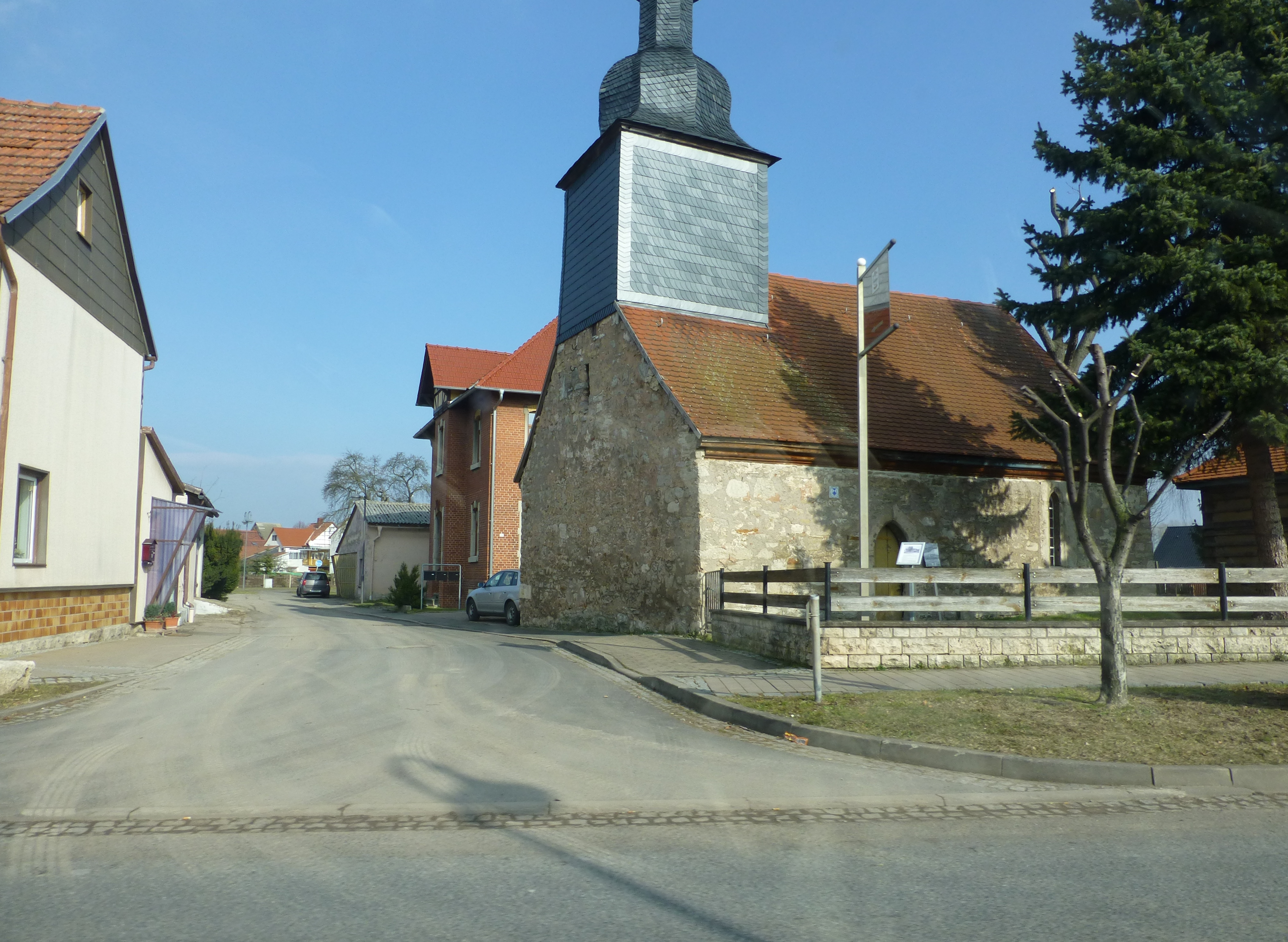 St. Andreaskapelle in Großengottern